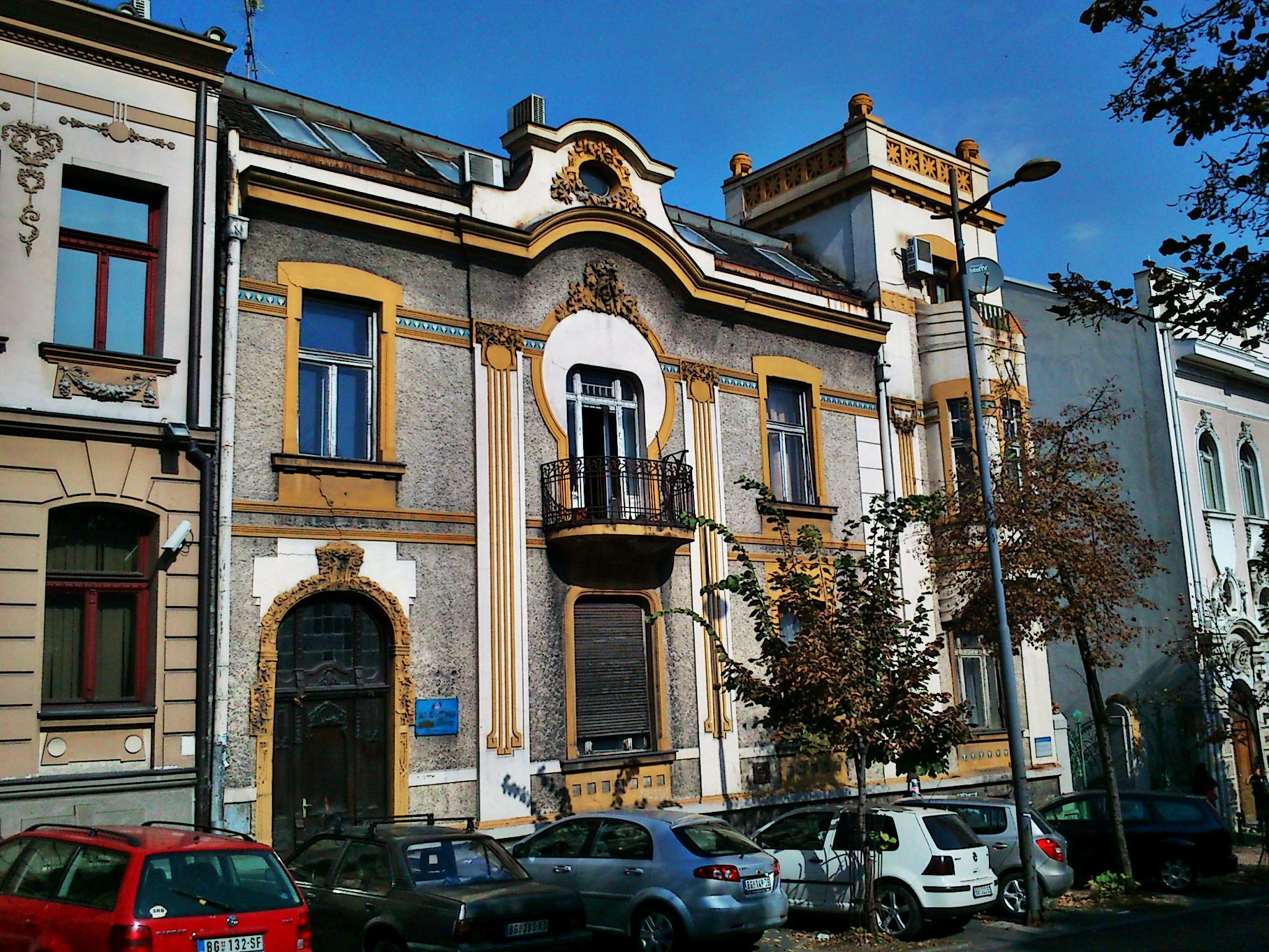 Кућа Леоне Панајот